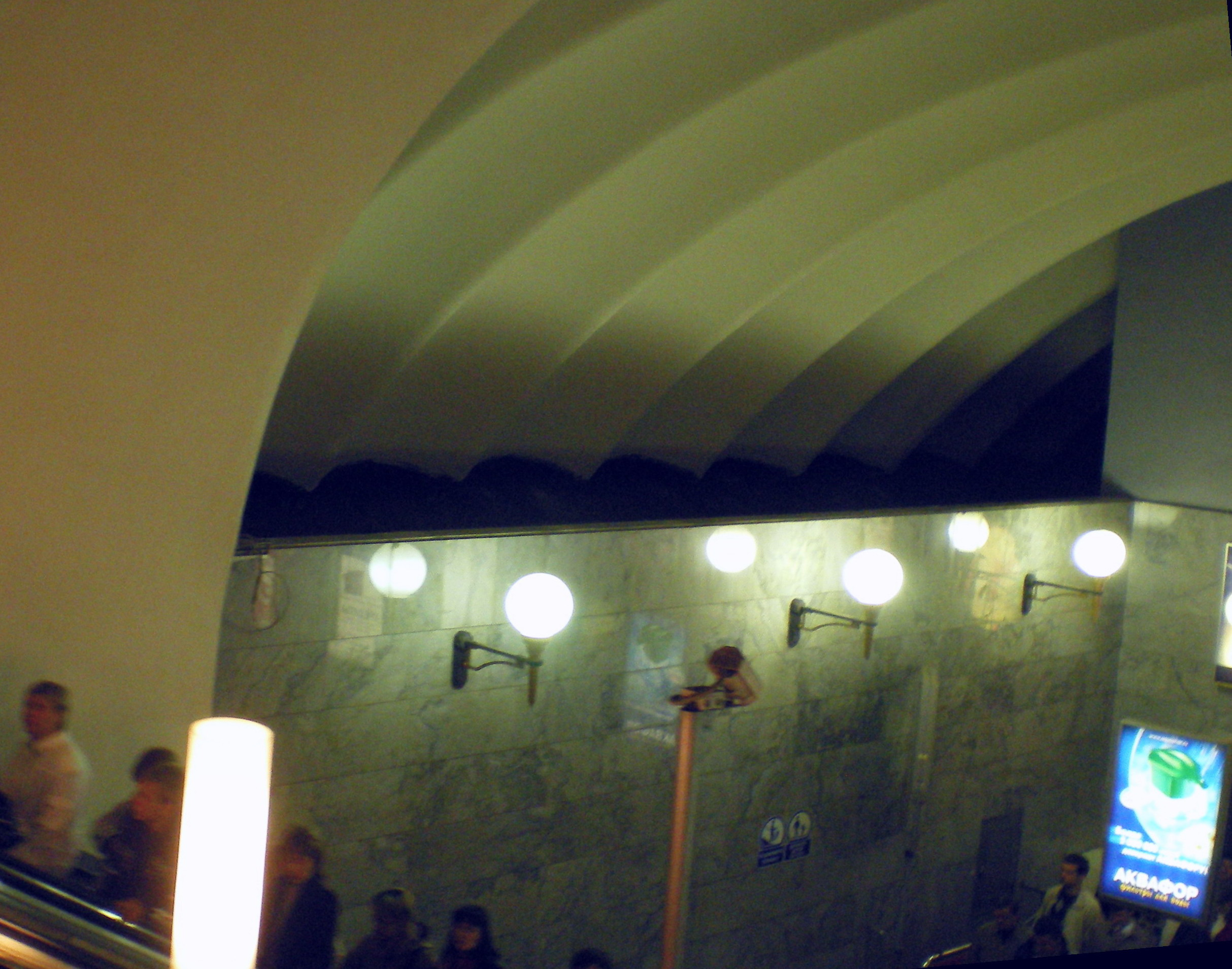 Нижний эскалаторный зал станции метро «Старая деревня»